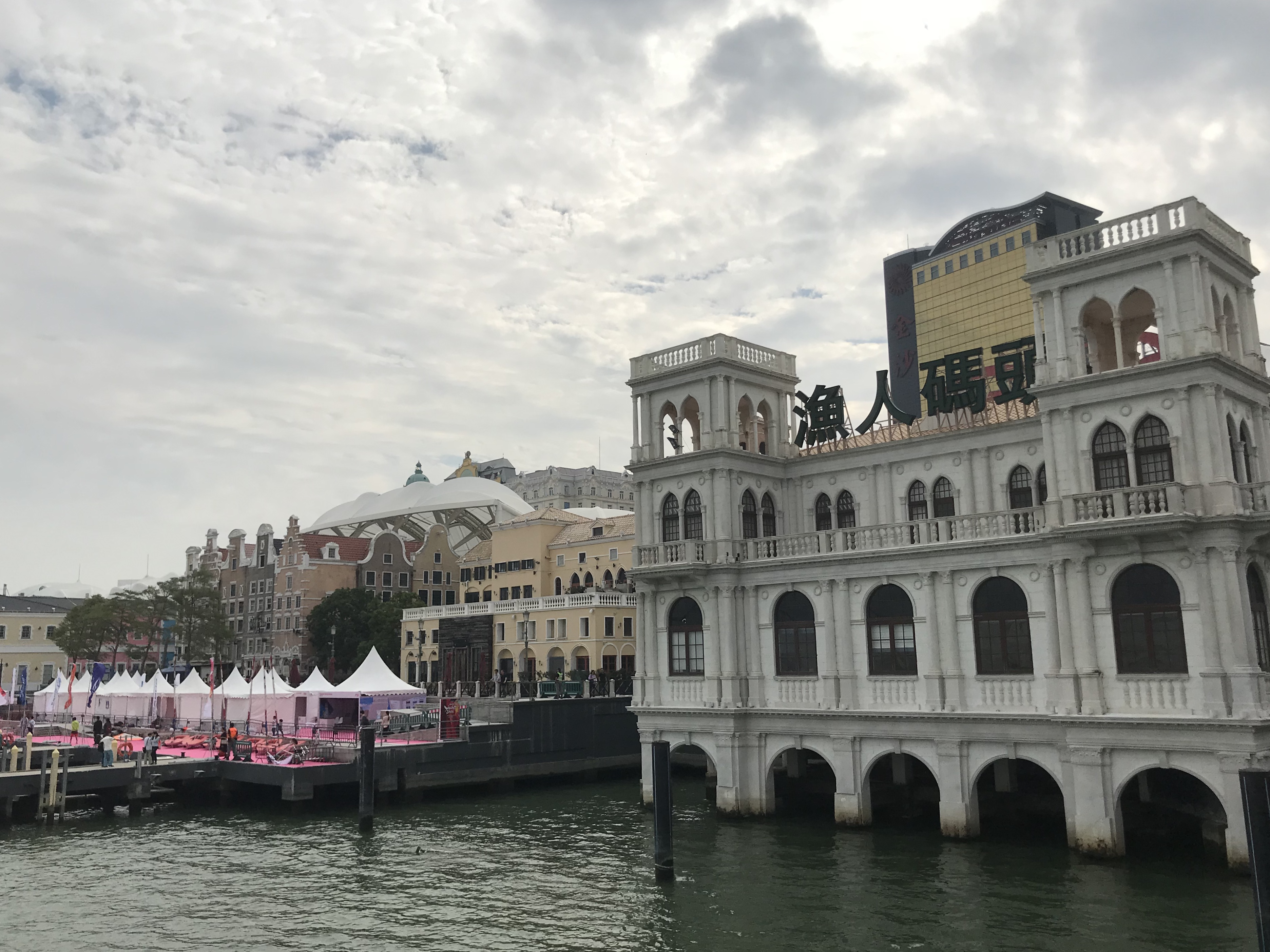 中文（台灣）: 澳門漁人碼頭。